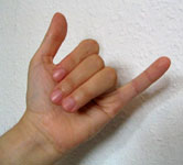 Chinesische Zahl Sechs